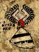 da Bild isch wiit öber 100 Joor alt Bischriibig s Woppe vo de Edel vo Eppeberg